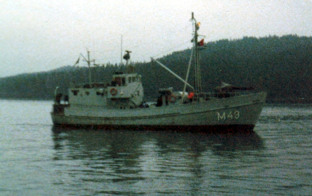 The Swedish minesweeper HMS Svartlöga (M49) 1977